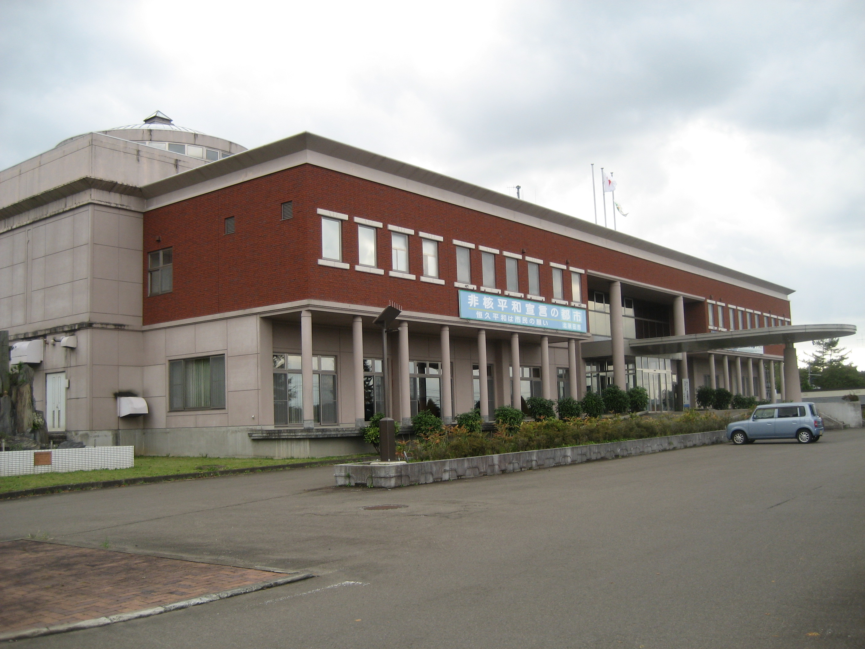 北秋田市役所森吉庁舎（旧森吉町役場）